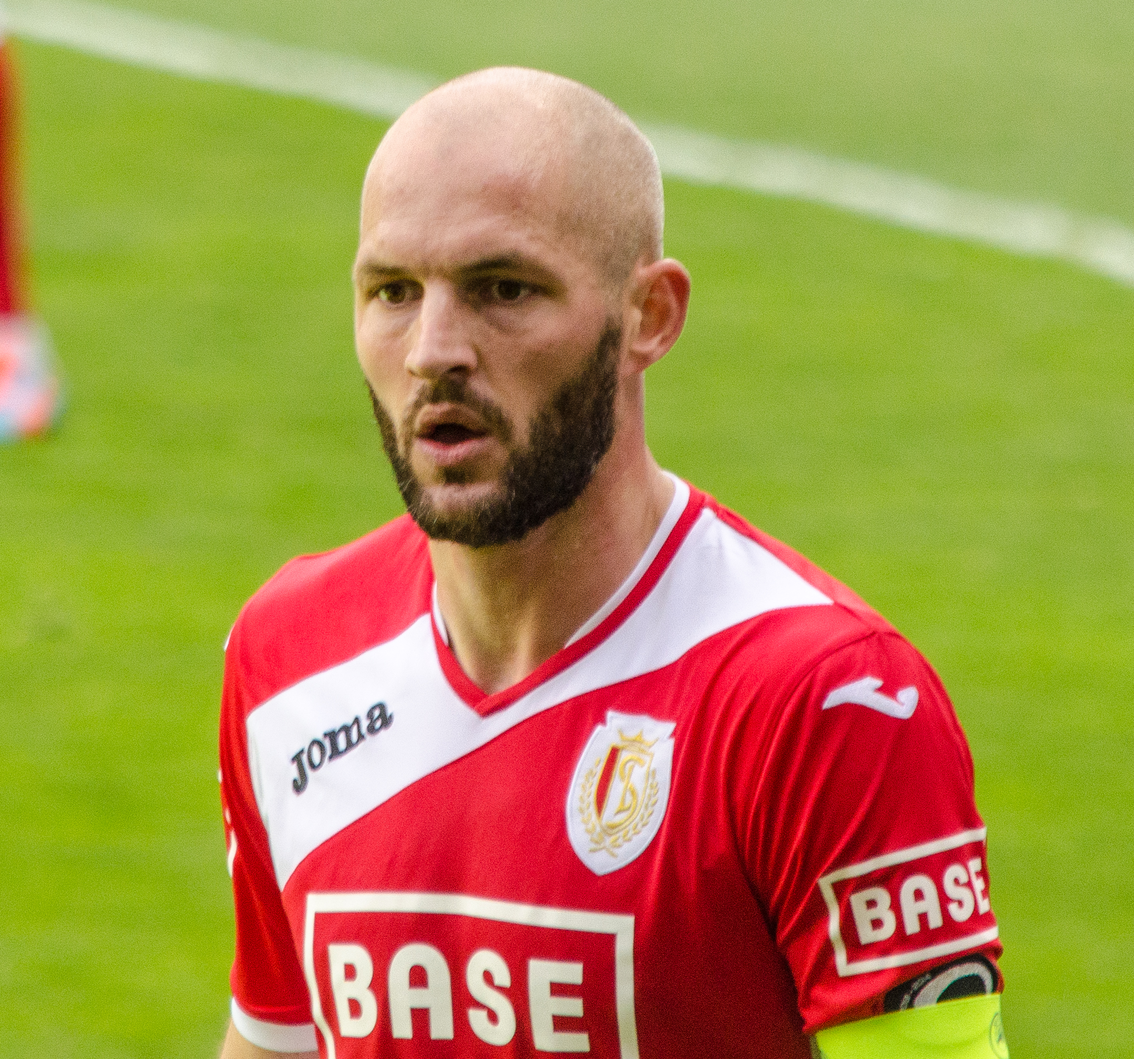 Jelle Van Damme playing for Standard Liege